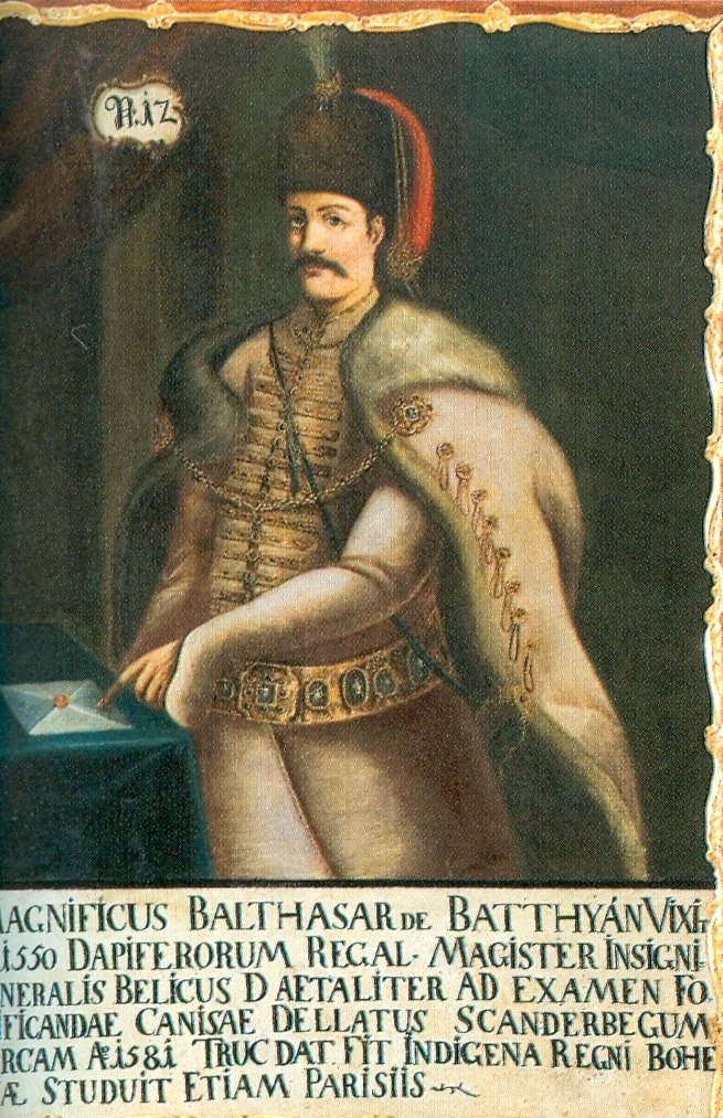 Batthyány Boldizsár portréja